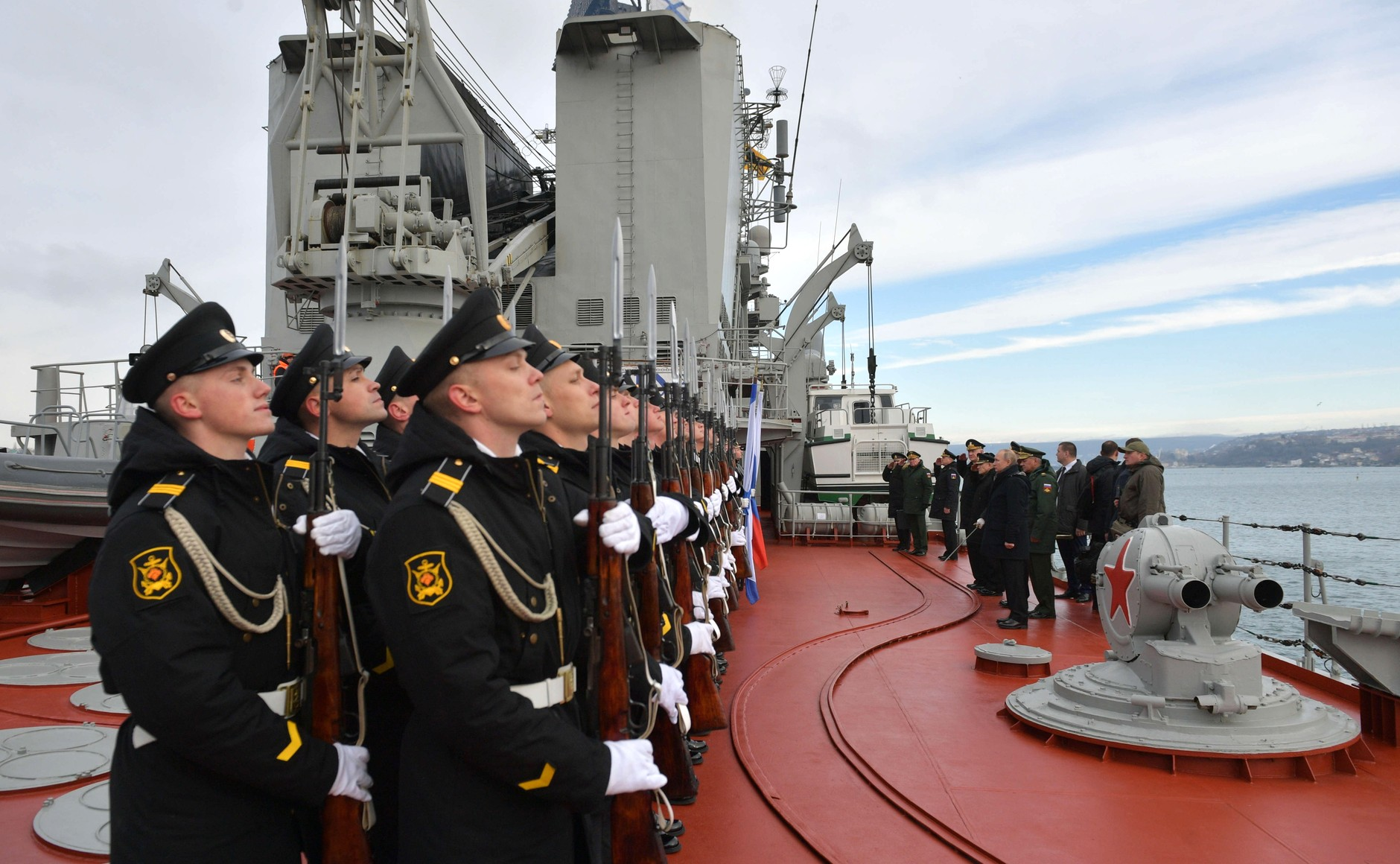 Совместные учения Северного и Черноморского флотов. Верховный Главнокомандующий Вооружёнными Силами Владимир Путин с борта ракетного крейсера «Маршал Устинов», находящегося в Чёрном море, наблюдал за ходом совместных учений Северного и Черноморского флотов с выполнением ракетных стрельб, в том числе крылатыми ракетами «Калибр» и гиперзвуковой аэробаллистической ракетой «Кинжал». На борту ракетного крейсера «Маршал Устинов» во время совместных учений Северного и Черноморского флотов.